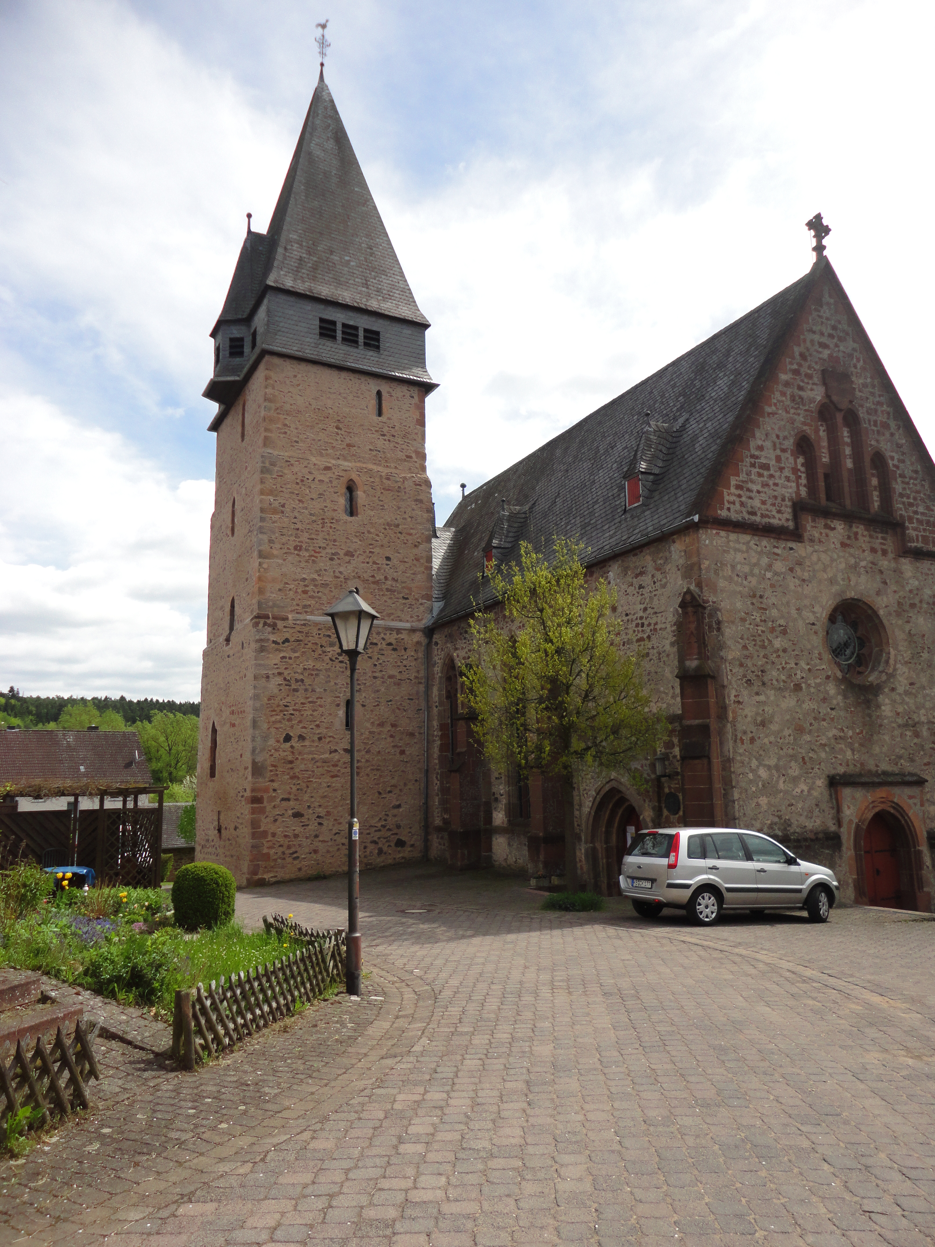 Die evangelische Kirche in Wiesenfeld (ehemalige Johanniterkirche), Westansicht